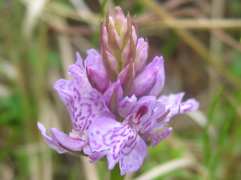 Geflecktes Knabenkraut Dactylorhiza maculata, Zingst